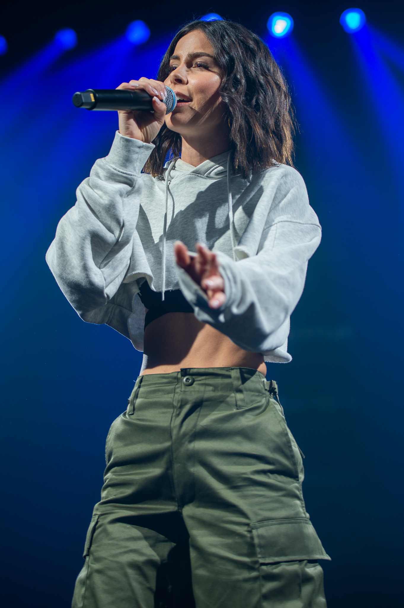 ARGO-Konzerte,Konzert,Lena Meyer-Landrut,Livekonzert,Livemusik,Löwensaal,Only Love Tour 2019